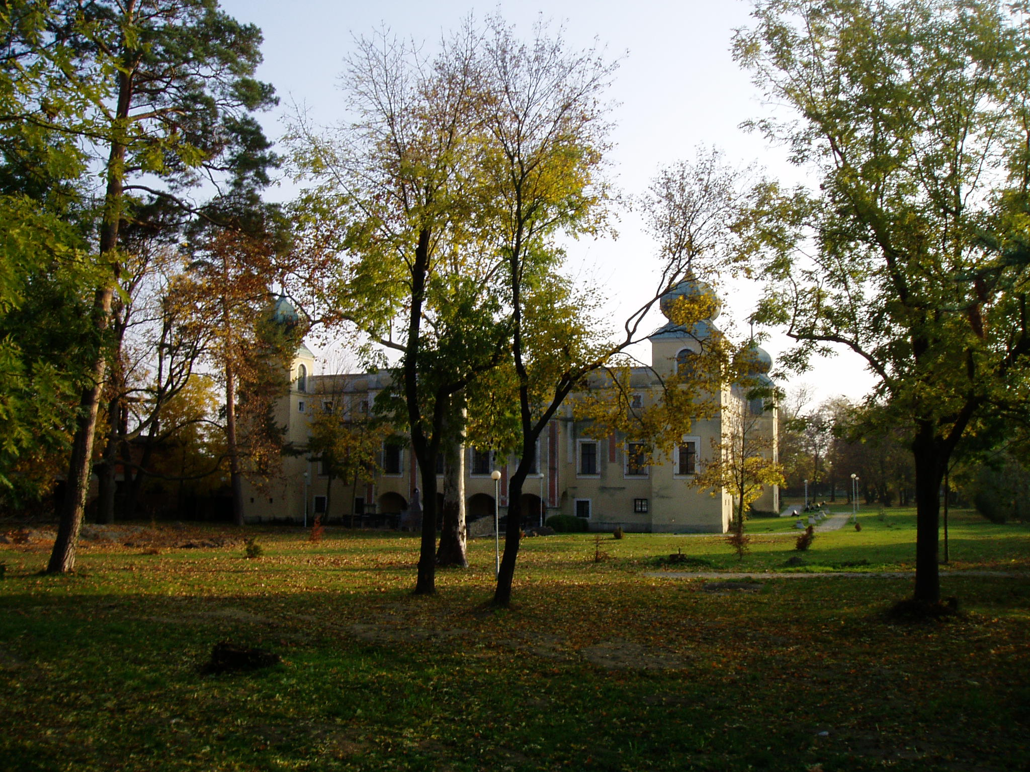 Kaštiel